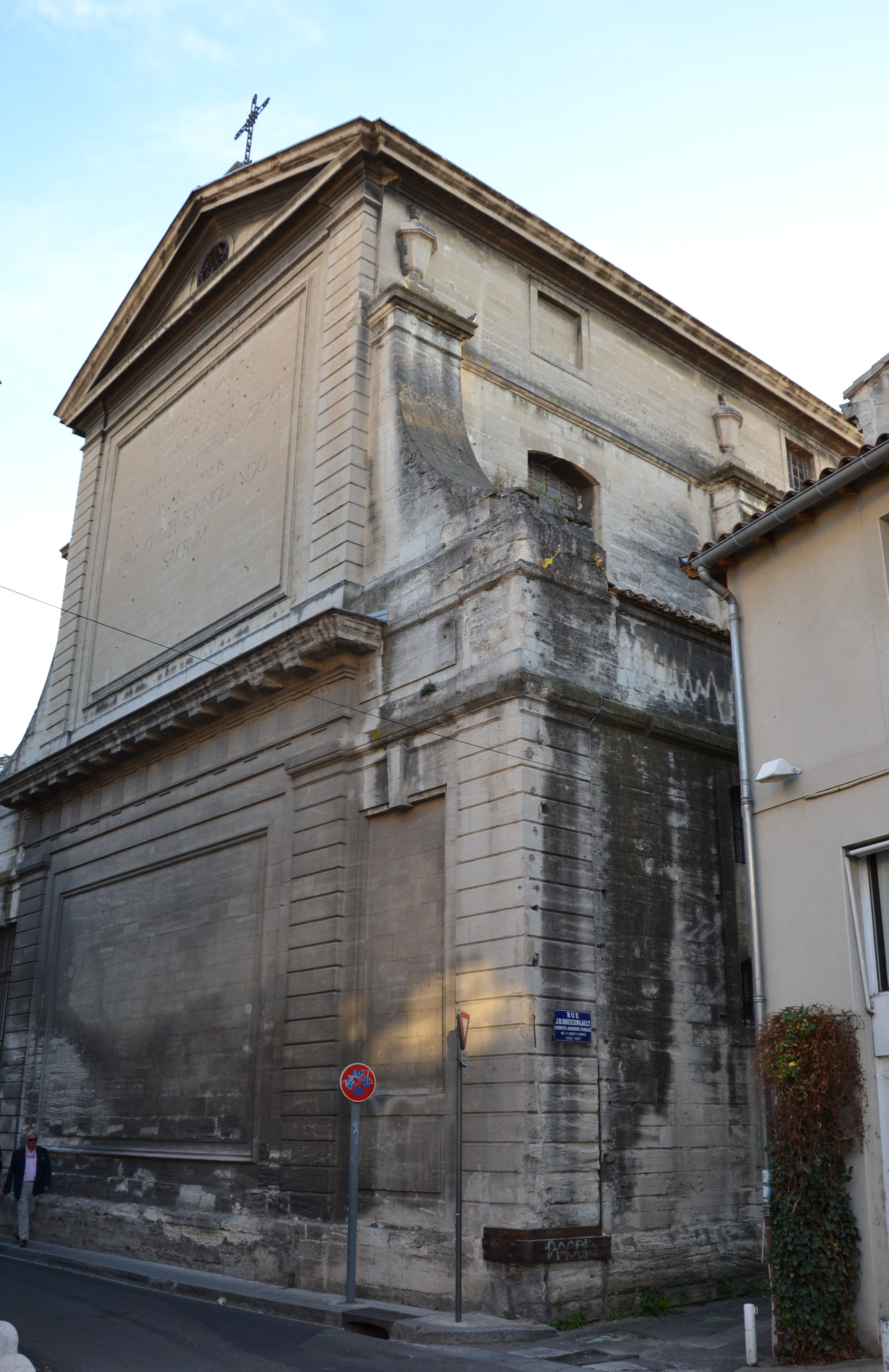 Chapelle Saint-Charlessacristie (Classé) .